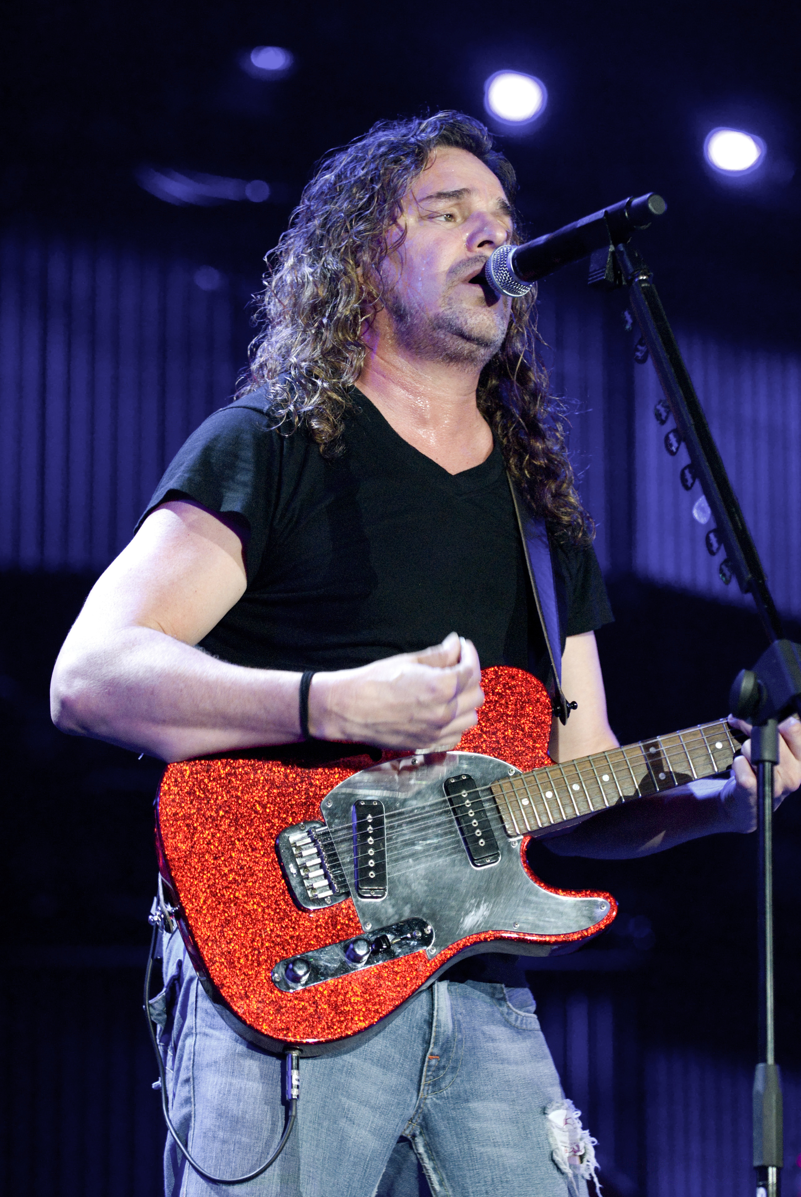 Maná